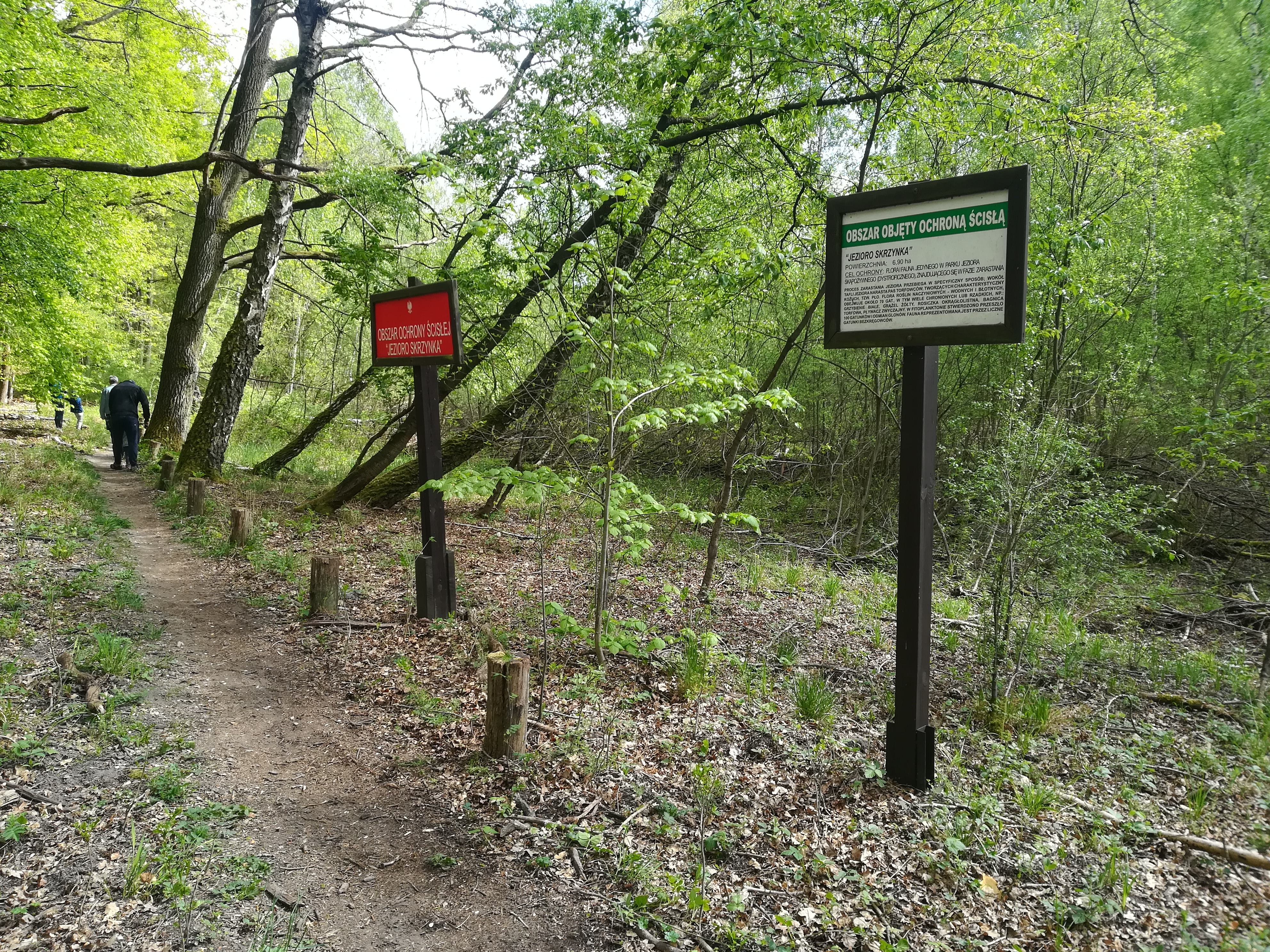 Wielkopolski Park Narodowy - Obszar Ochrony Ścisłej Jezioro Skrzynka.